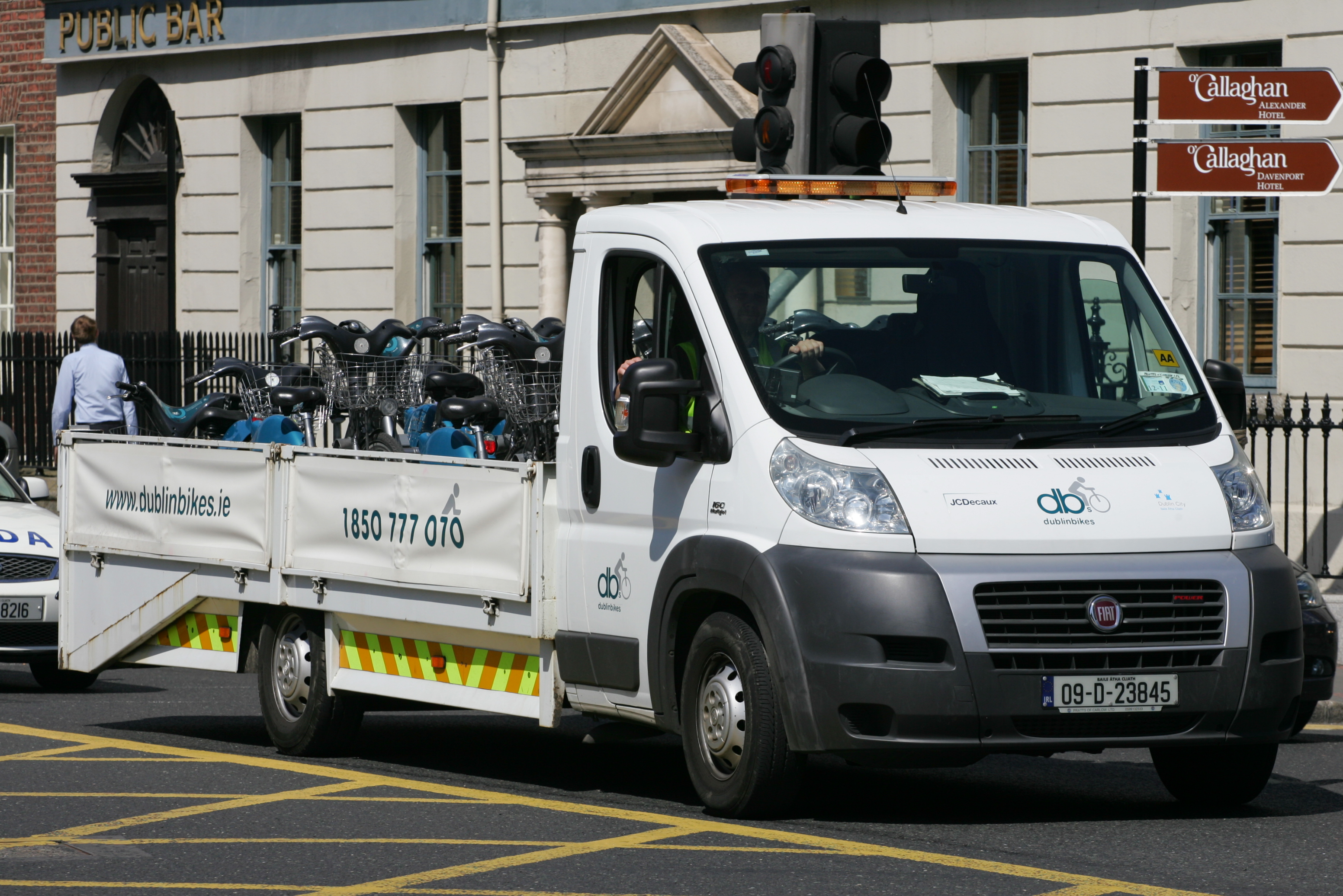 The Bike van!!!